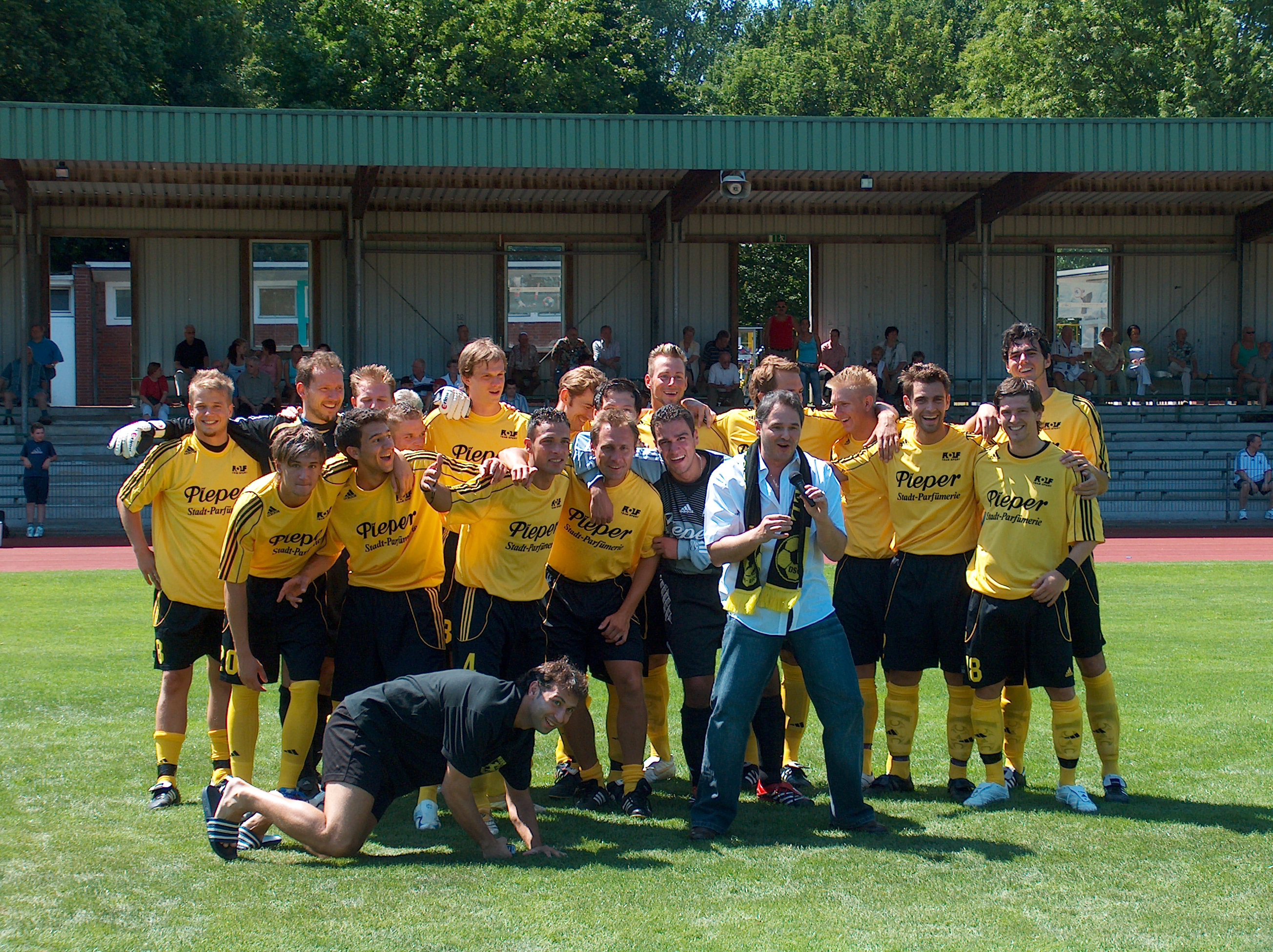 Schlagersänger Frank Lindner hat auf Initiative des damaligen DSC Webmaster für die Fußballabteilung des DSC Wanne-Eickel ein eigenes Vereinslied komponiert. Premiere war am 15.7.06 im Vereinslokal "Römereck" in Wanne-Eickel. Am 16.07.2006 wurde der Song den Fans im Sportpark Wanne-Eickel (heute Mondpalast-Arena) vorgestellt. Die CD ist bei Heimspielen des DSC Wanne-Eickel im Vereinsheim erhältlich oder unter .